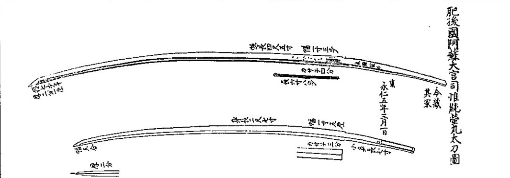 肥後国阿蘇大宮司蔵蛍丸太刀図。 松平定信編 『集古十種』より。 Japanese sword "Hotarumaru," pictured in the Edo period